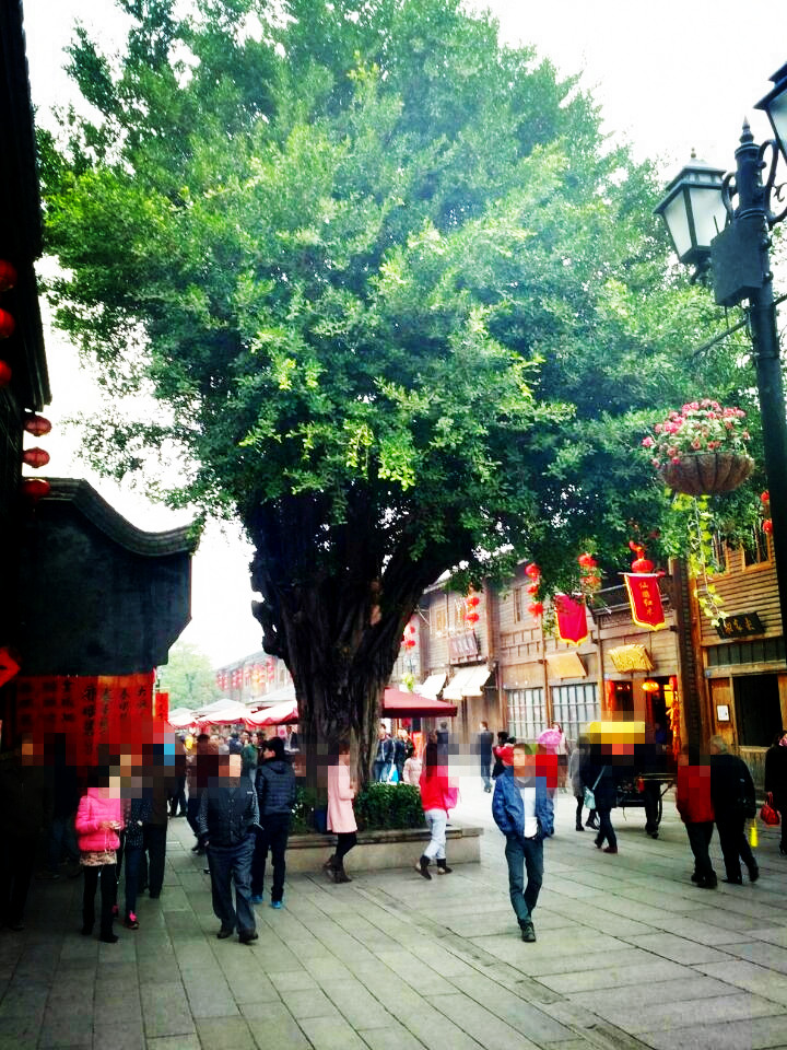 中文（中国大陆）: 福州三坊七巷的榕树